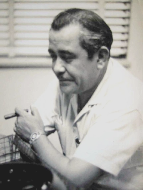 Ursinio Rojas en su oficina al inicio del Triunfo de la Revolucion.